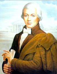 Laurynas Stuoka-Gucevicius